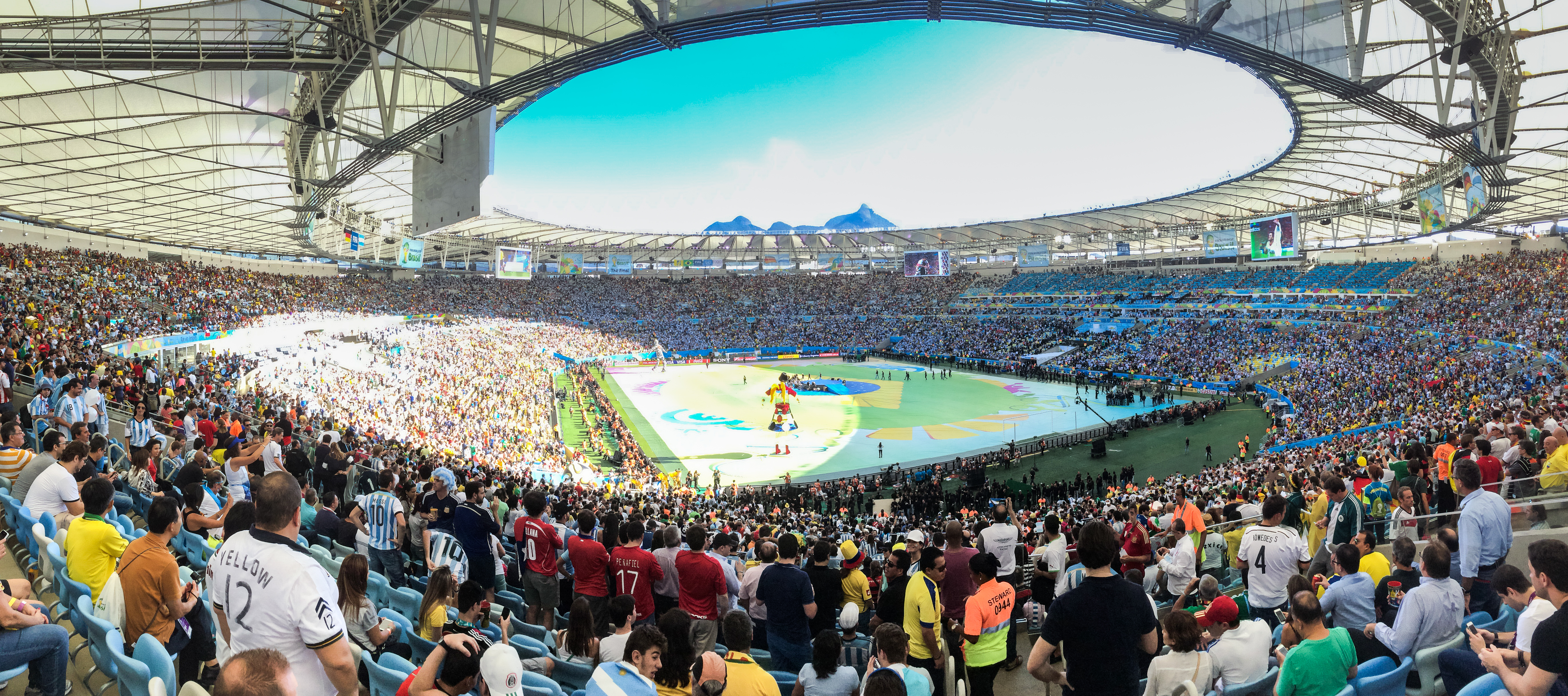 Stadion Rio de Janeiro Finale WM 2014